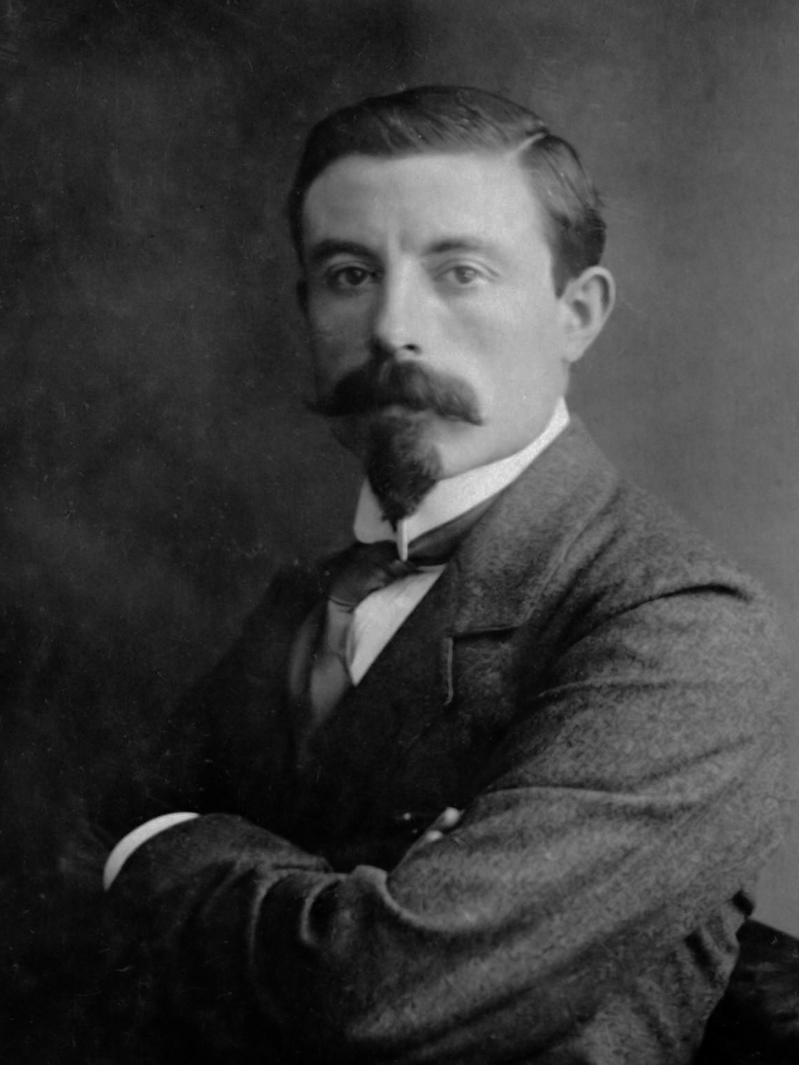 L.C. Brinkman, benoemd tot burgemeester van Den Bommel, voorheen burgemeester van Oud-Vossemeer 1917